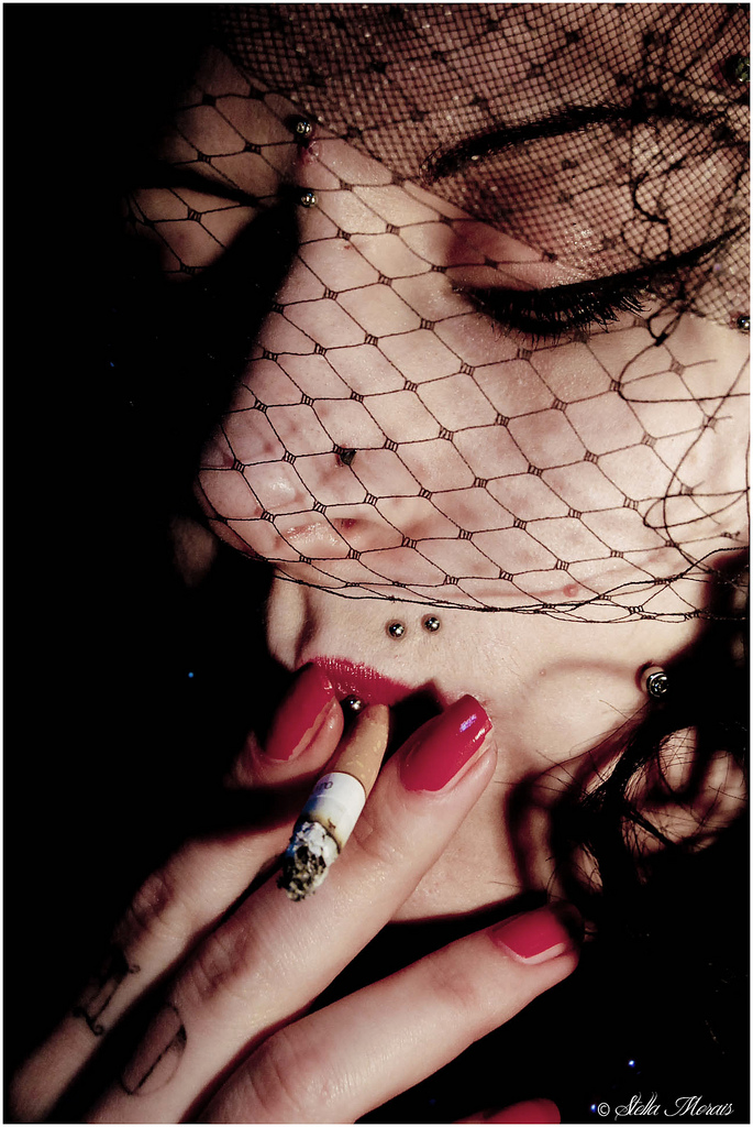 Alicja Wrona